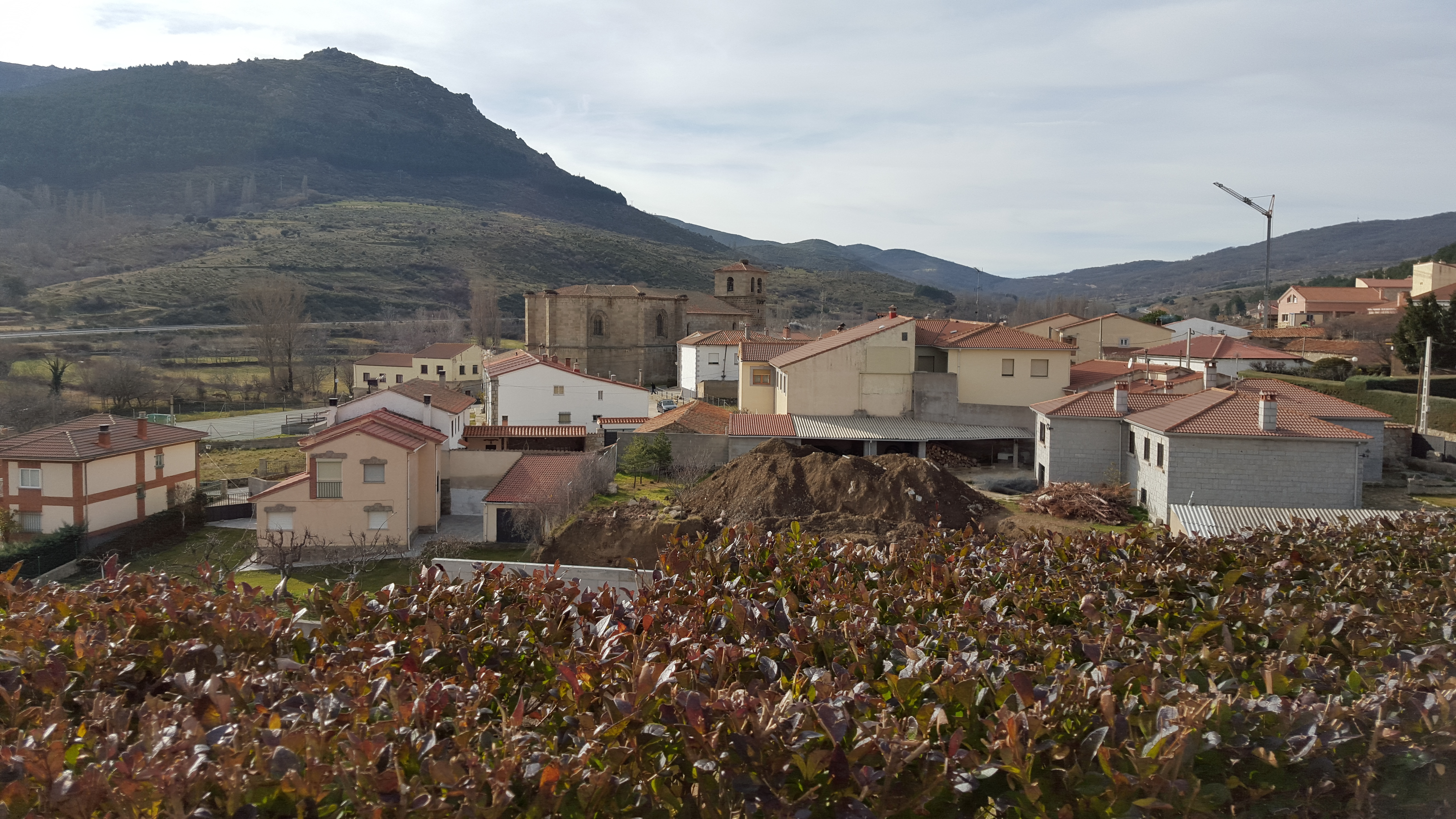 Vista general de la iglesia de Villatoro, Ávila, España.